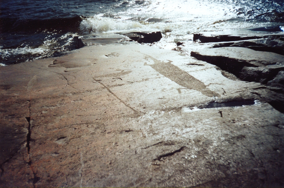 Выдра (или ящерица) с мыса Бесов Нос